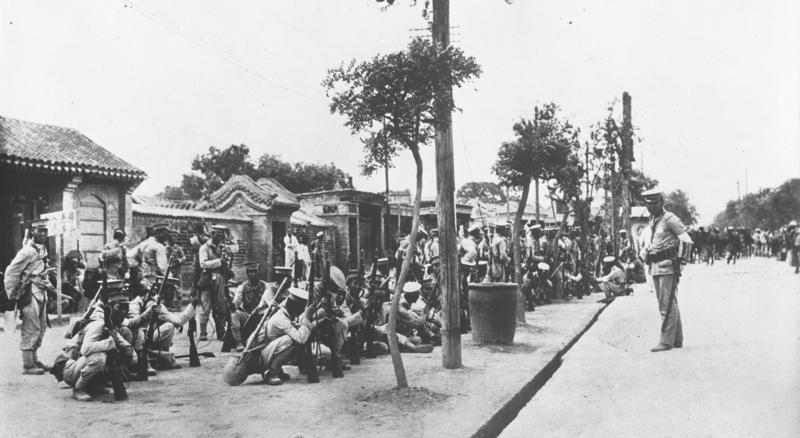 Zu dem chinesisch-japanischen Conflikt in der Mandschurei ! Truppen des Generals Chang Kai Shek alarmbereit in den Strassen Pekings.